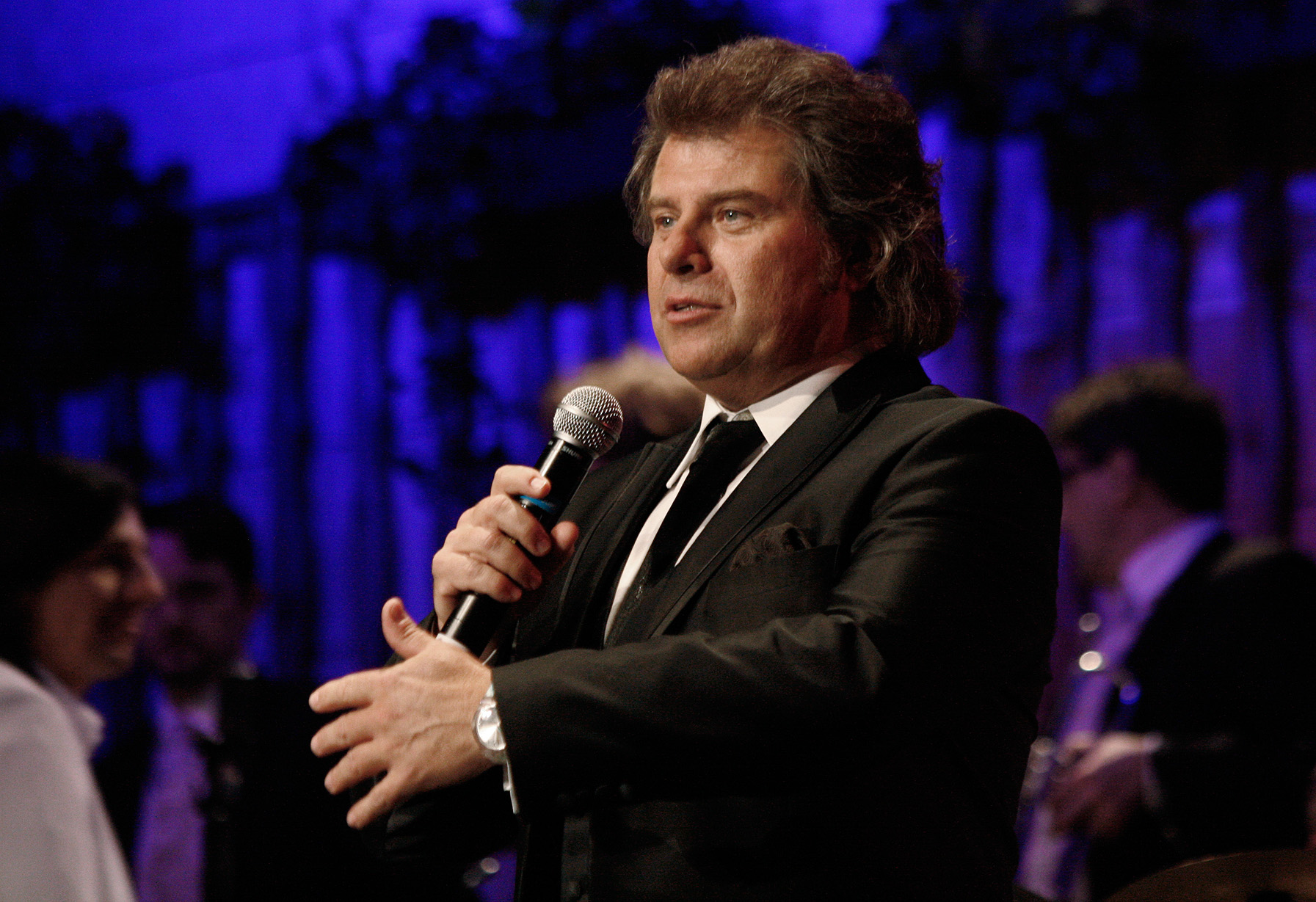 Andy Borg mit der Musikantenstadl-Tournee in der Wiener Stadthalle.